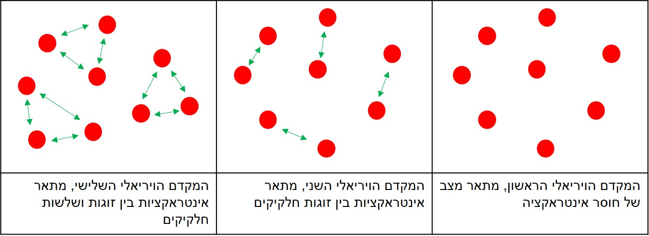 המחשה של המקדמים הויריאליים עבור גז לא אידיאלי